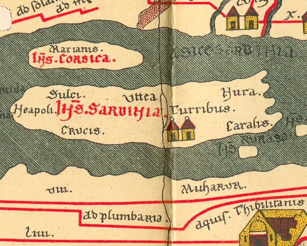 Sardinia, Tabula Peutingeriana